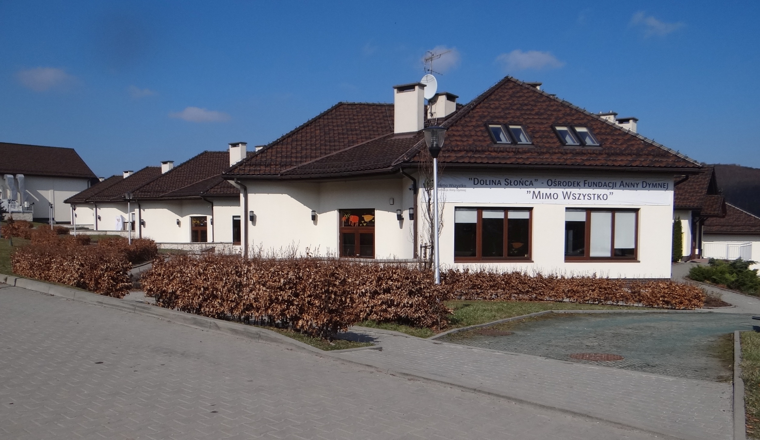 Radwanowice Fundacja A. Dymna